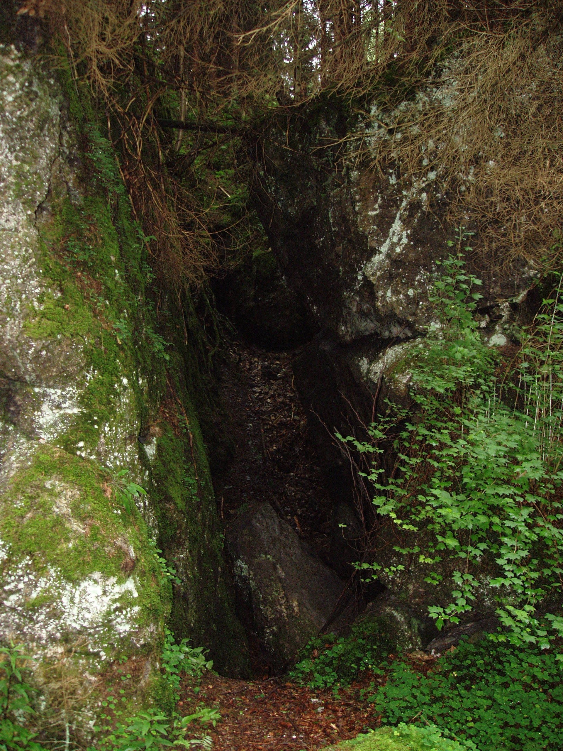 Mittelalterliche Bergbauspuren in Oberschulenberg